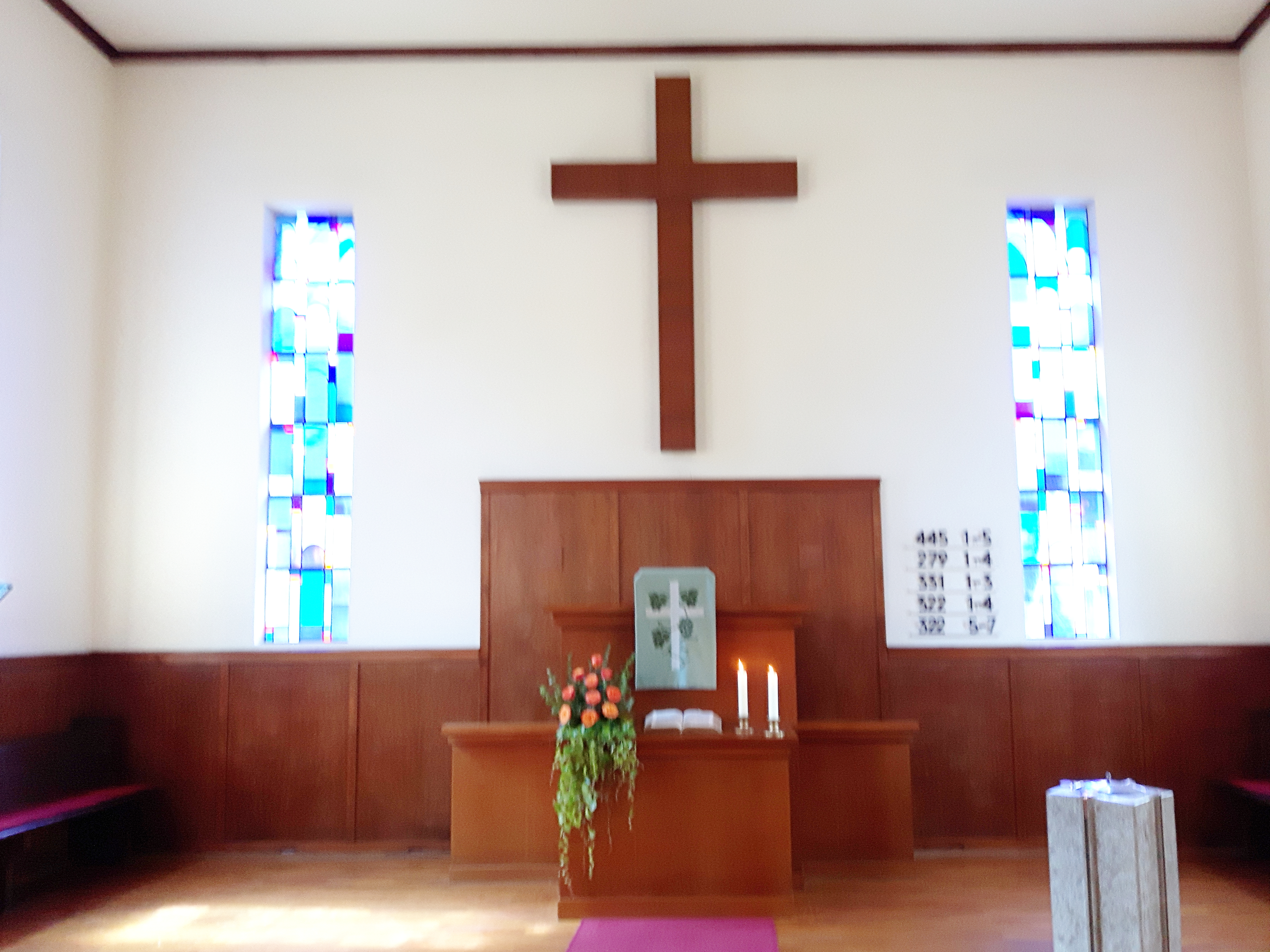 Evangelische Kirchen zum Guten Hirten Bludenz (Vorarlberg) Innenraum